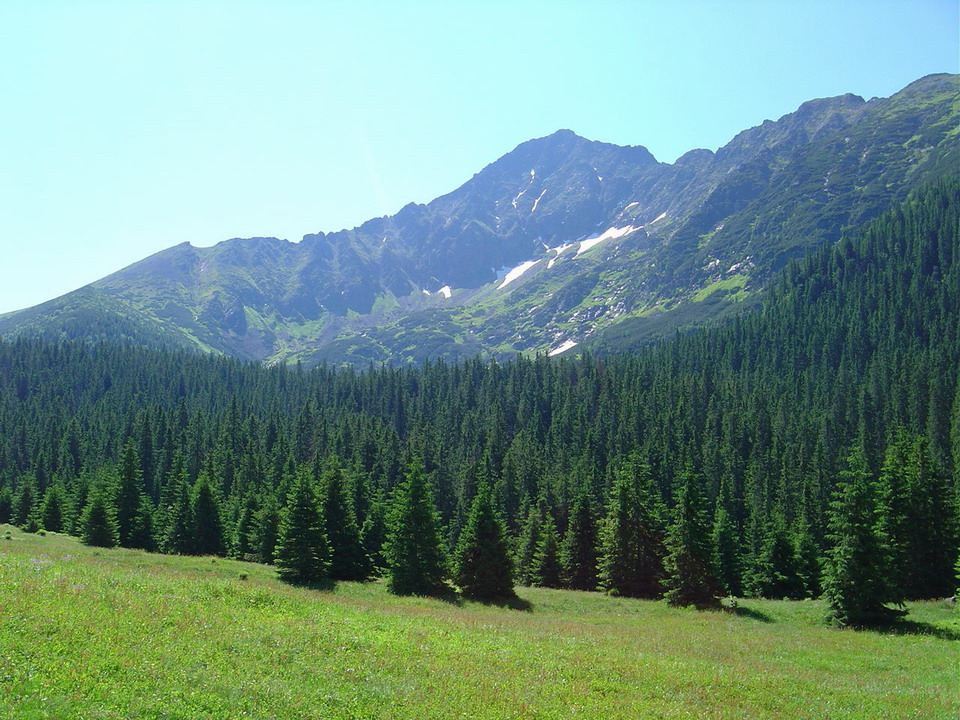 Jahnaci_stit_from_Zadne_Medodoly